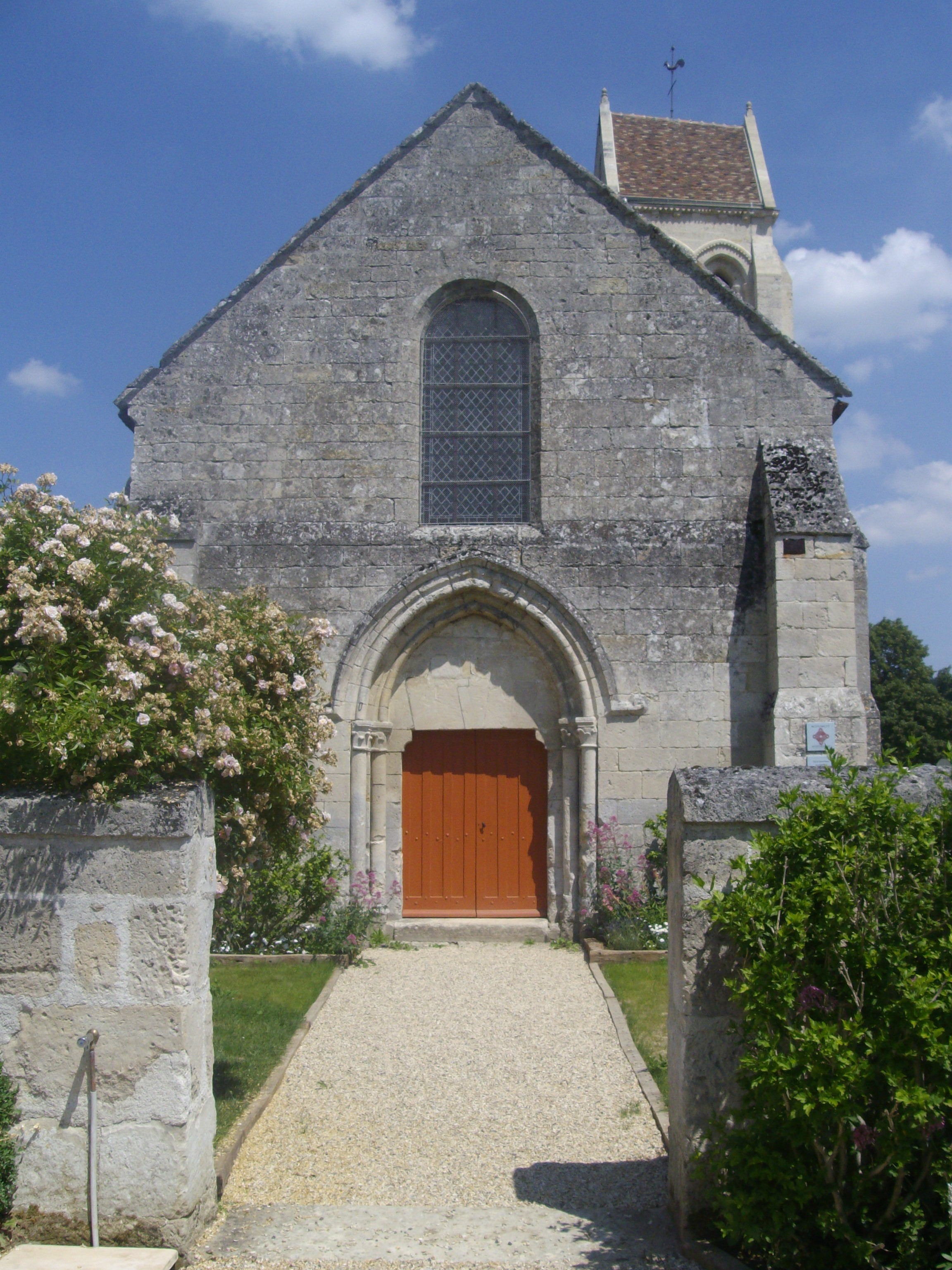 Façade de l'église Notre-Dame de Pondron, Fresnoy-la-Rivière